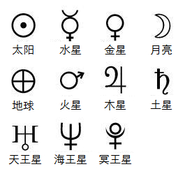 说明 原图来自英语维基百科，适用原图的许可协议。 from zh::Image:Astrological Glyphs.jpg